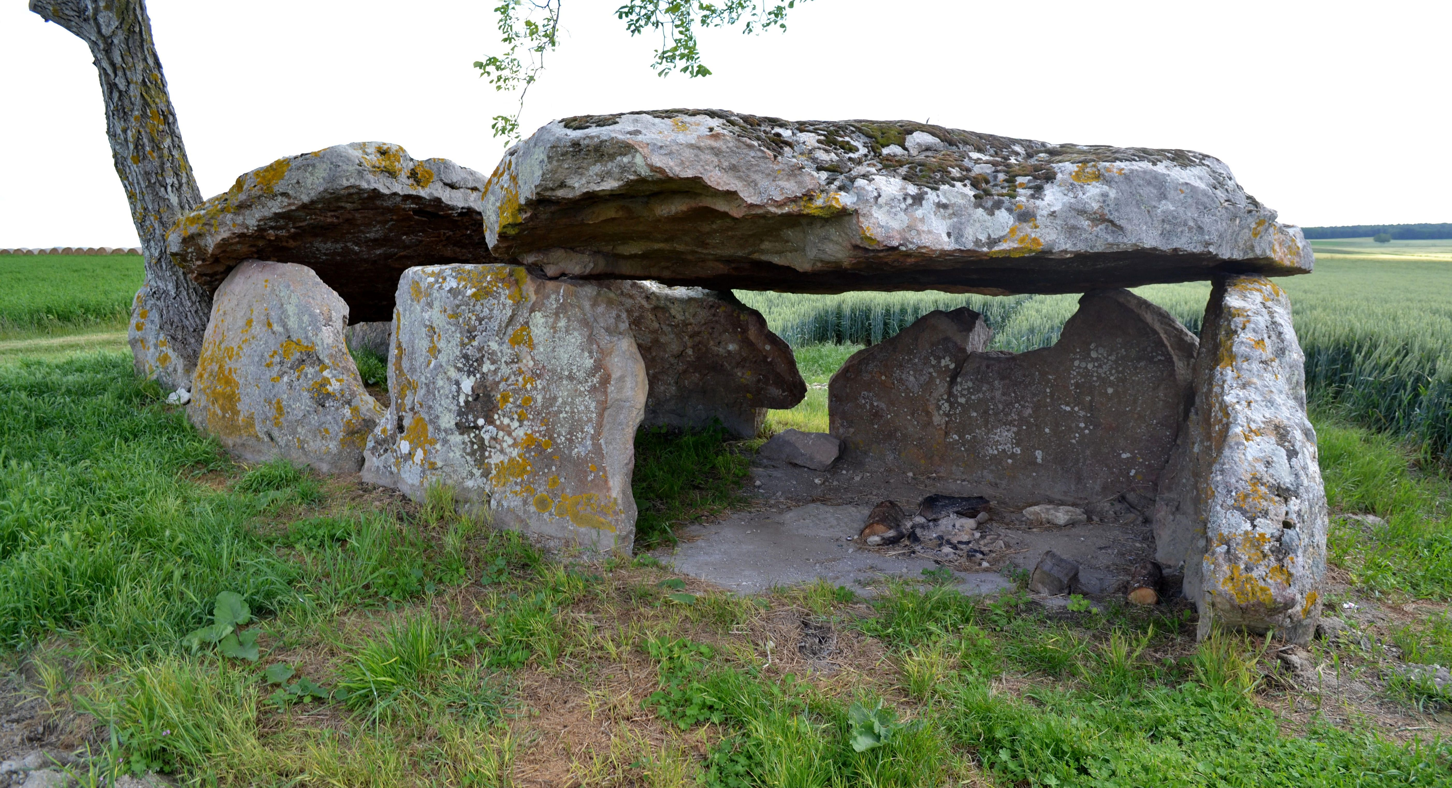 Dolmen de Vaon, Les Trois-Moutiers (86).